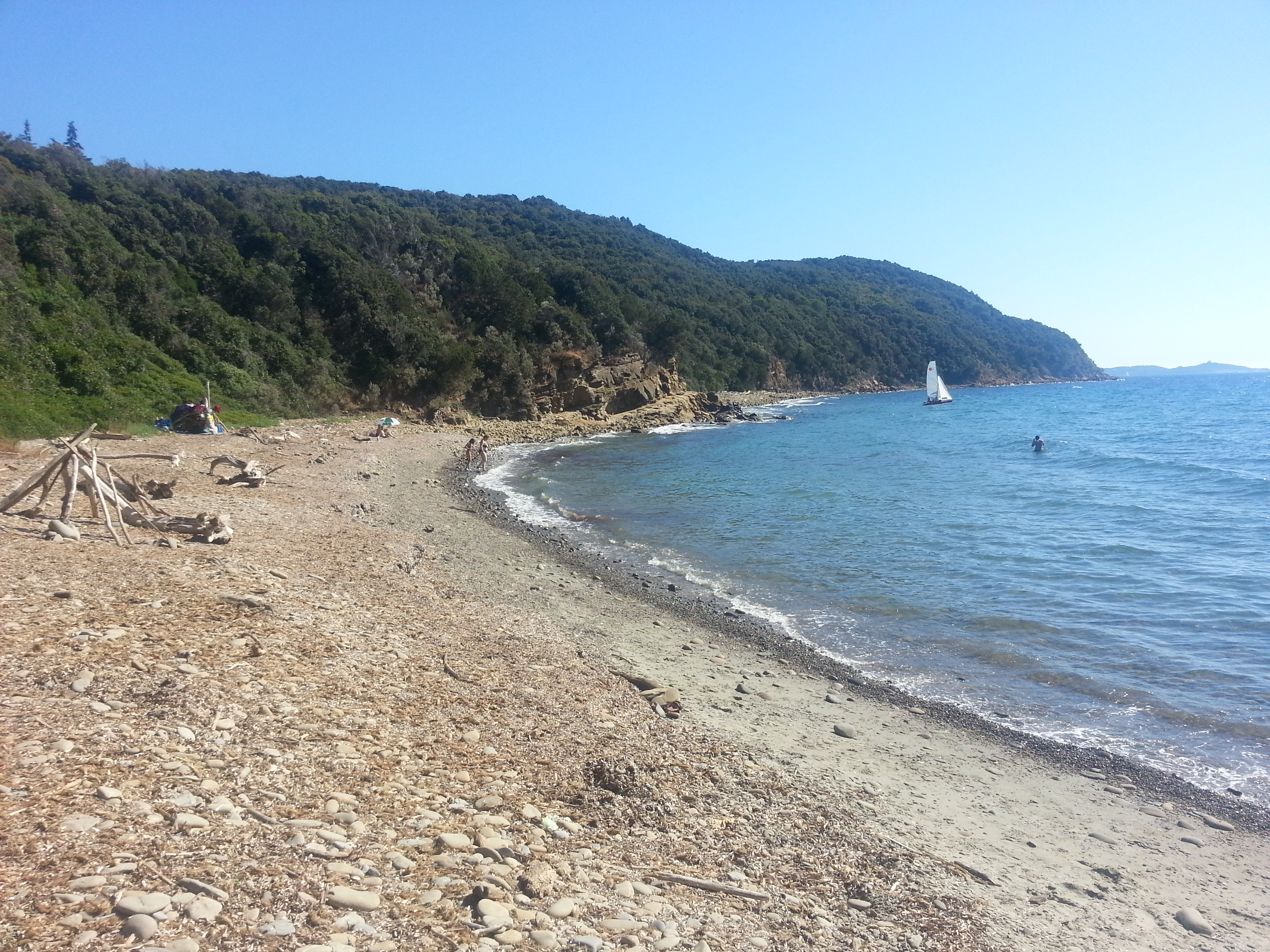 Cala Martina